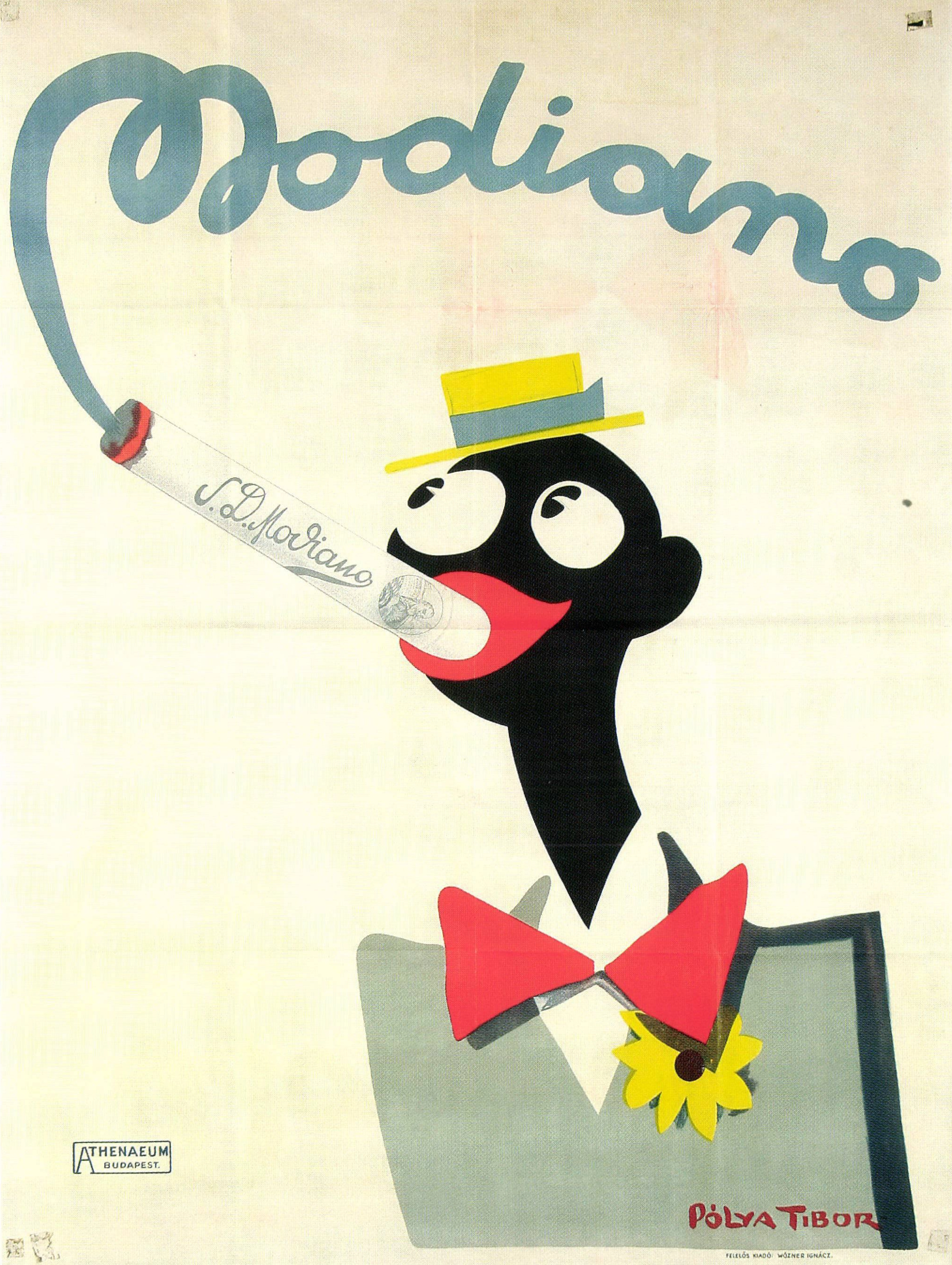 Poster for Modiano